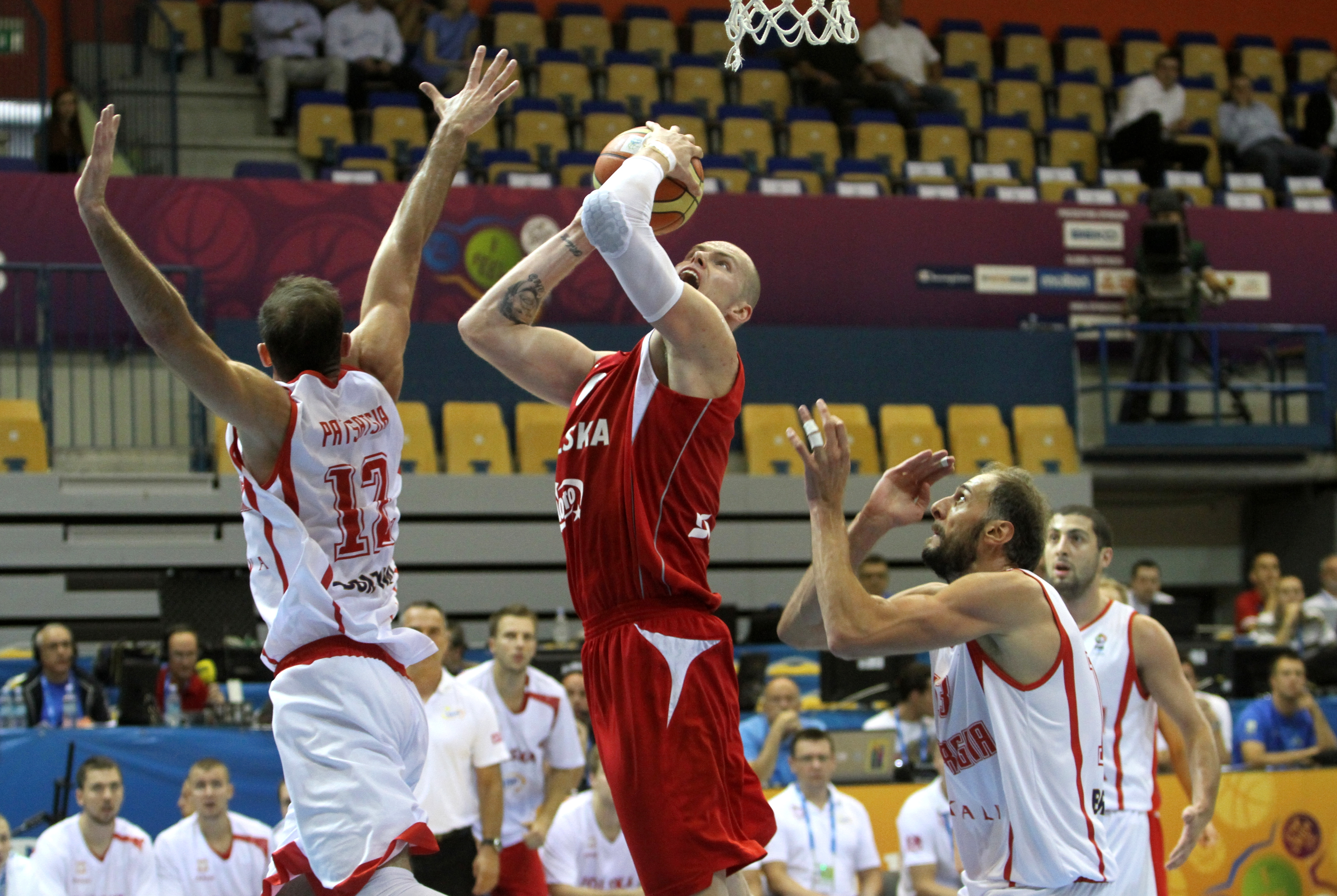 Reprezentacja Polski koszykarzy z 2013 roku. Maciej Lampe